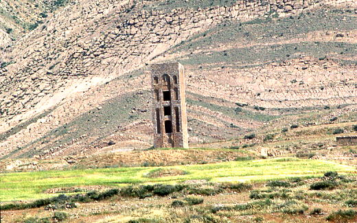 Kalâa des Béni Hammad, Algérie